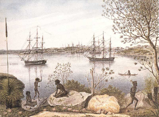 Михайлов Павел Николаевич - Вид города Сиднея в Порт-Джексоне